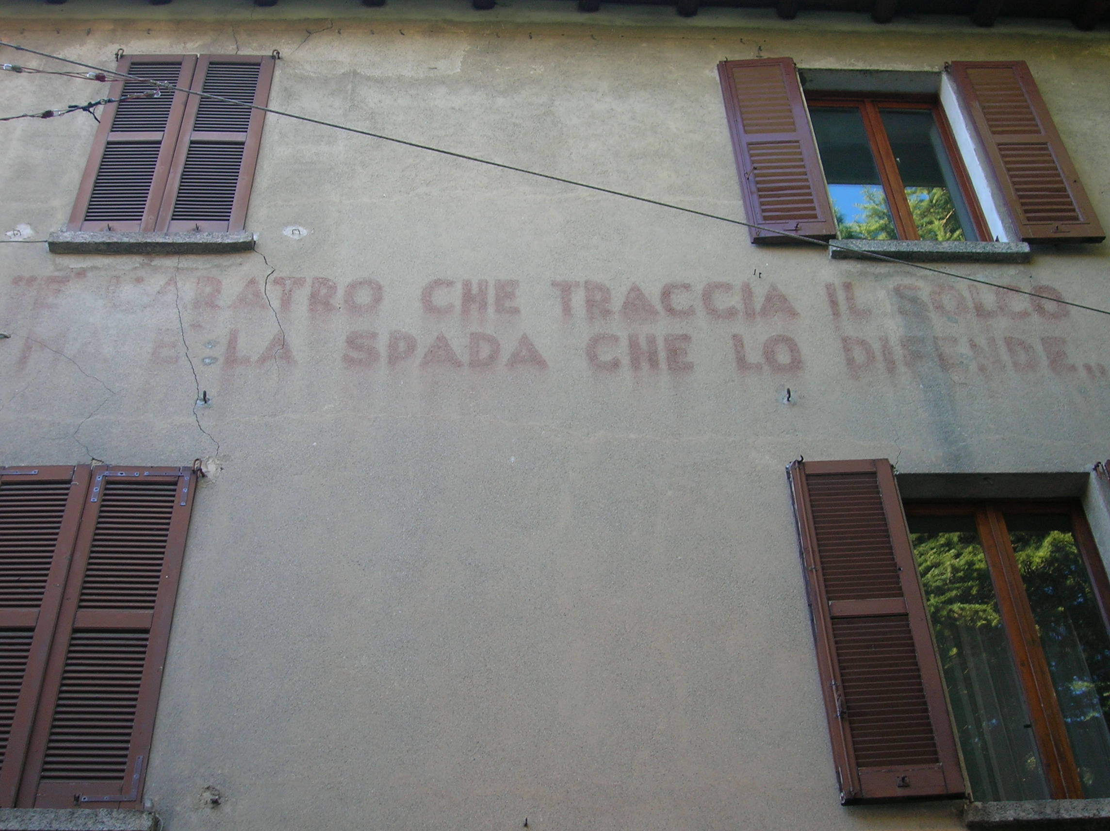 scritta fascista sul muro di una casa di Asso. Si legge: È l'aratro che traccia il solco / ma è la spada che lo difende..""